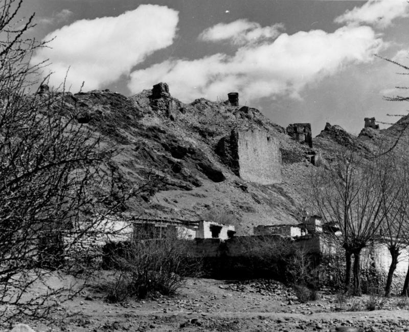 Jalung [Yalung]-Podrang, Ruinen des Palastes